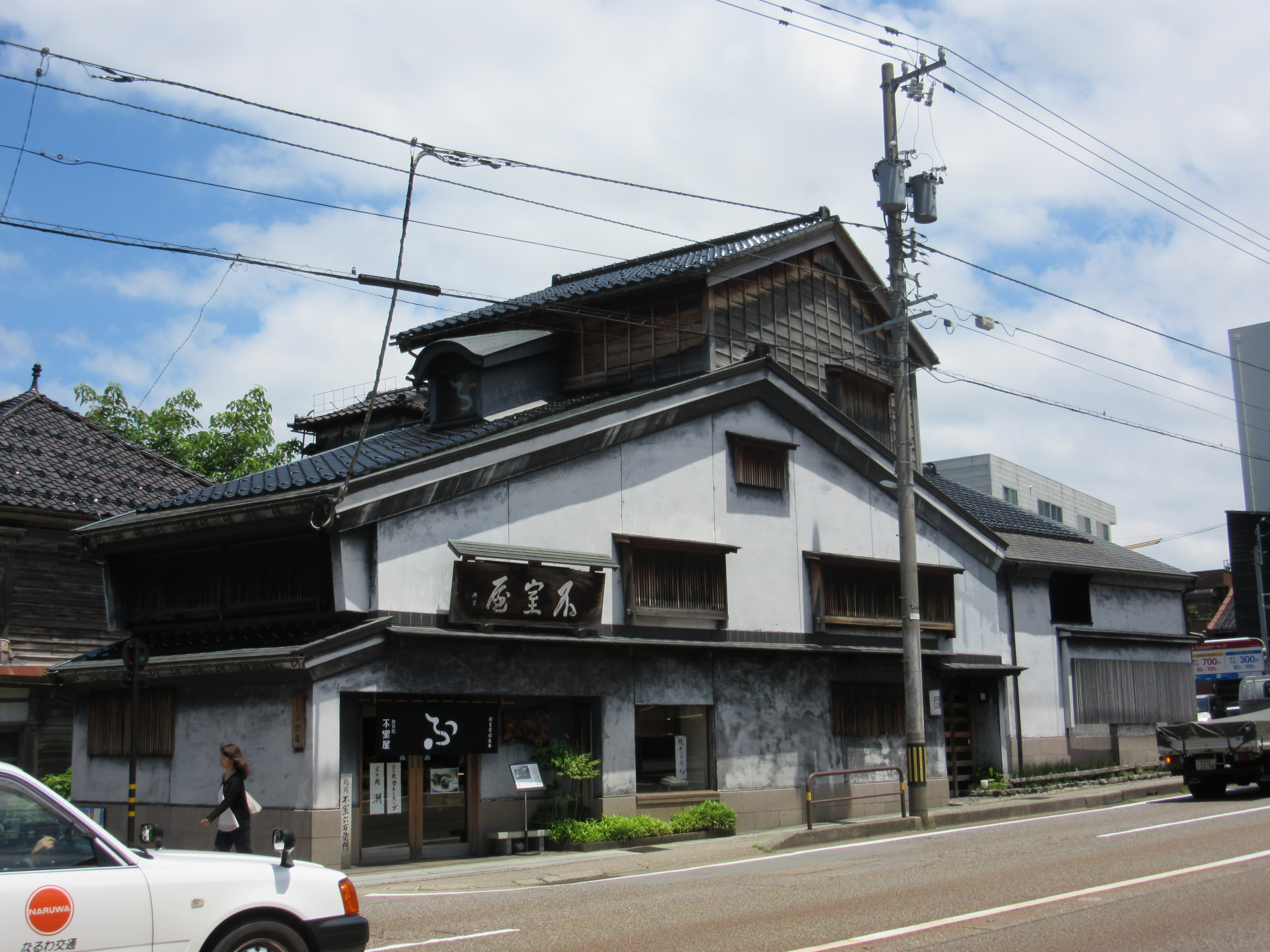 不室屋本店